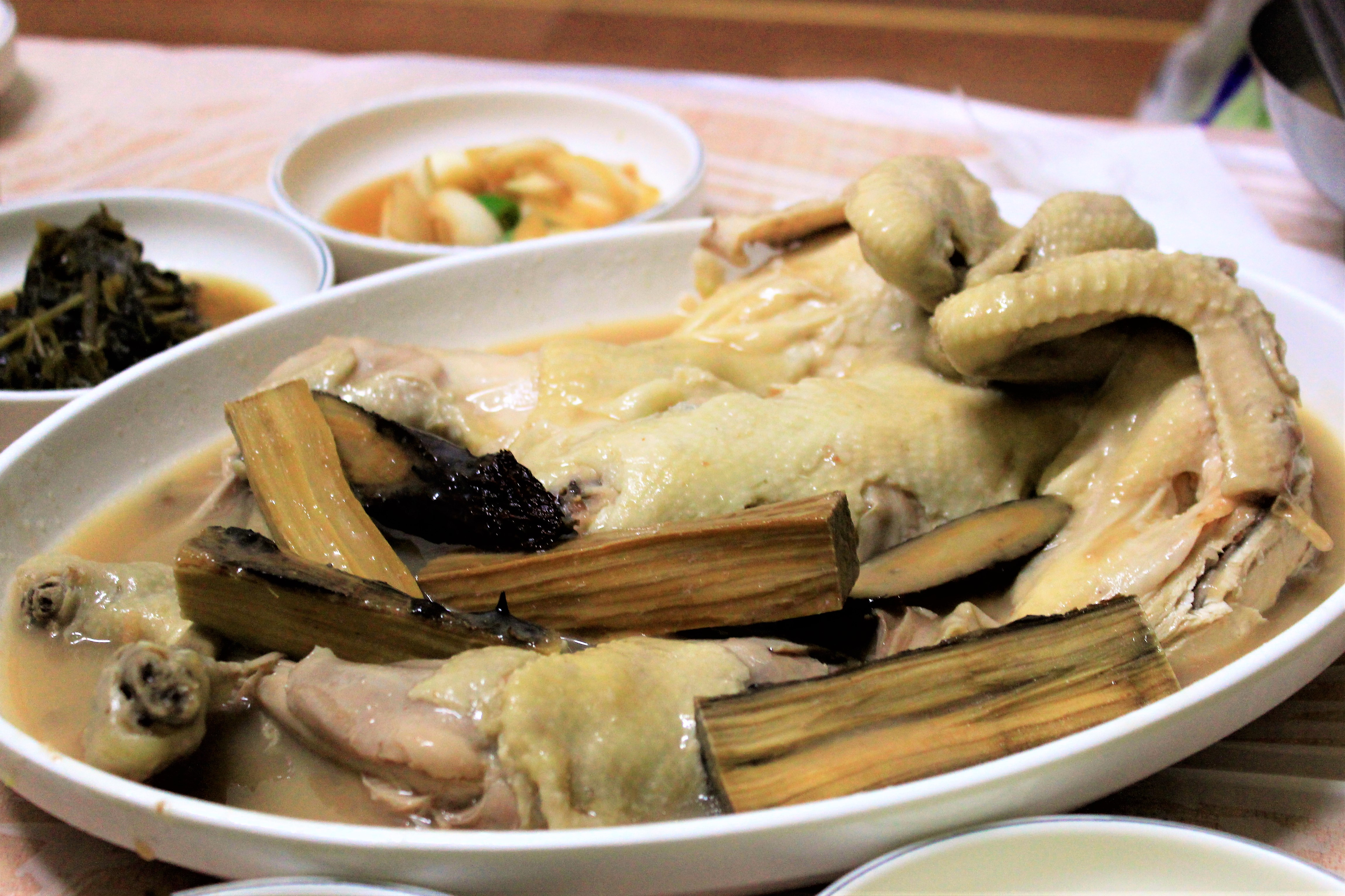 청송 달기약수탕과 갖은 한약재를 넣고 끓인 백숙